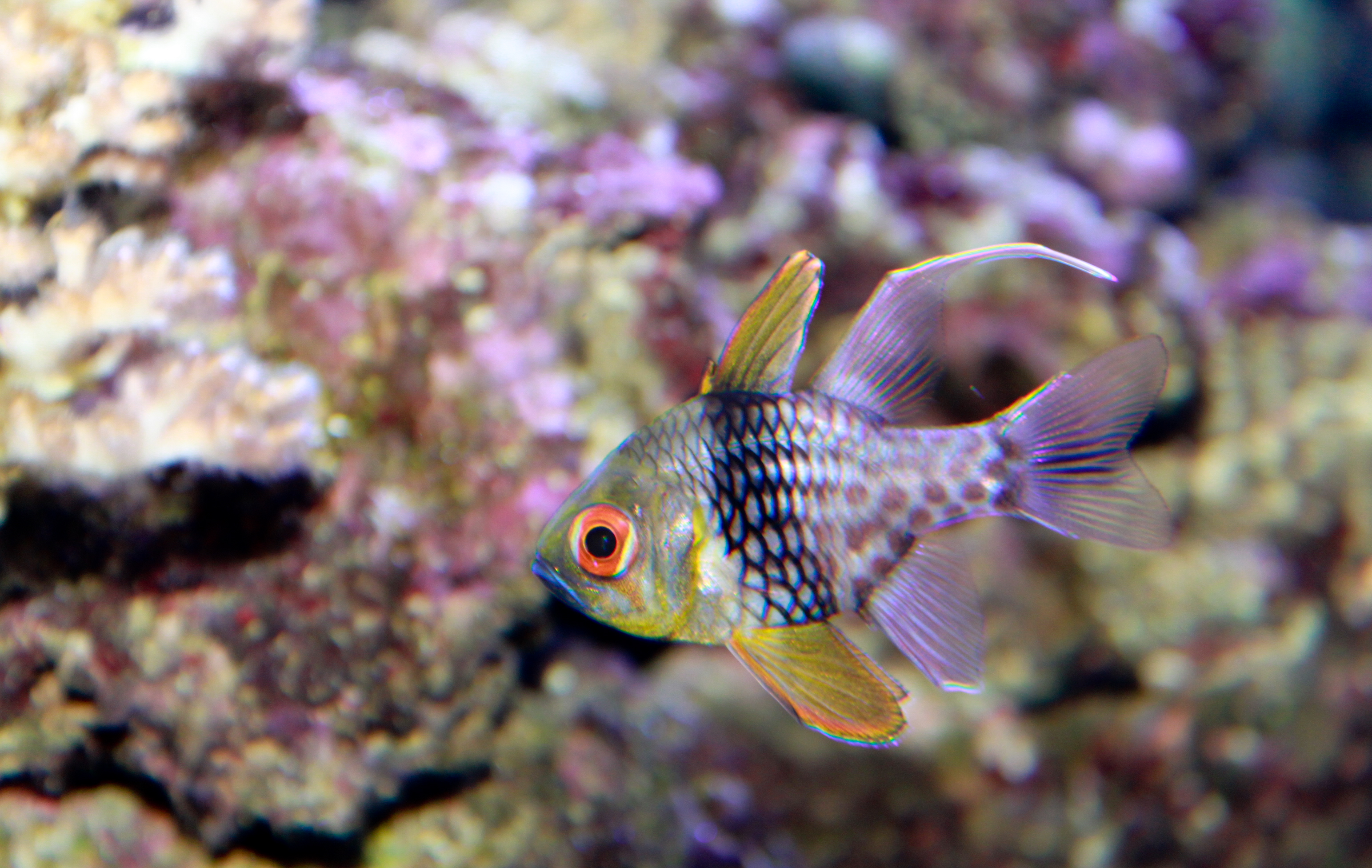 Pajama cardinal fish Sphaeramia nematoptera